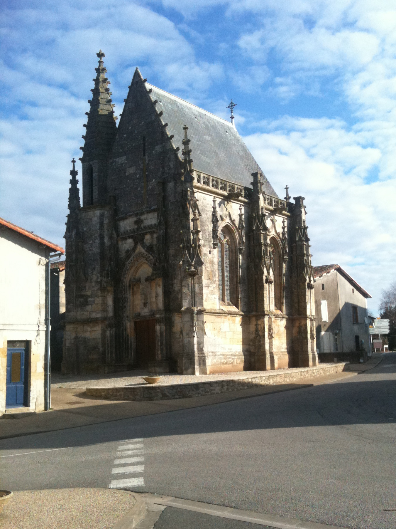 Chapelle de style gothique flamboyant